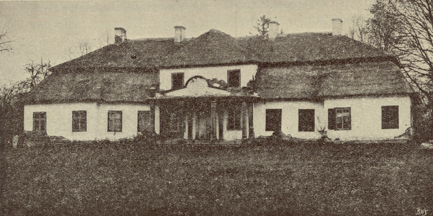 Беларуская (тарашкевіца): Голдава (Hołdava), сядзіба Важынскіх (Važynski)